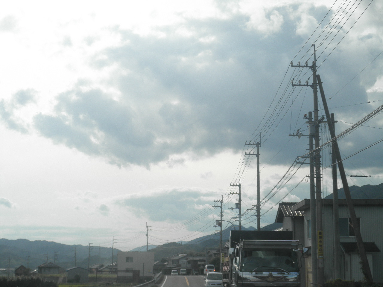 徳島県阿南市内原町井ノ坪 徳島県道286号津乃峰筒崎線